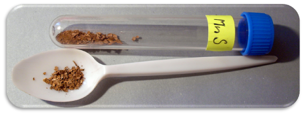 Sulfid manganatý - MnS